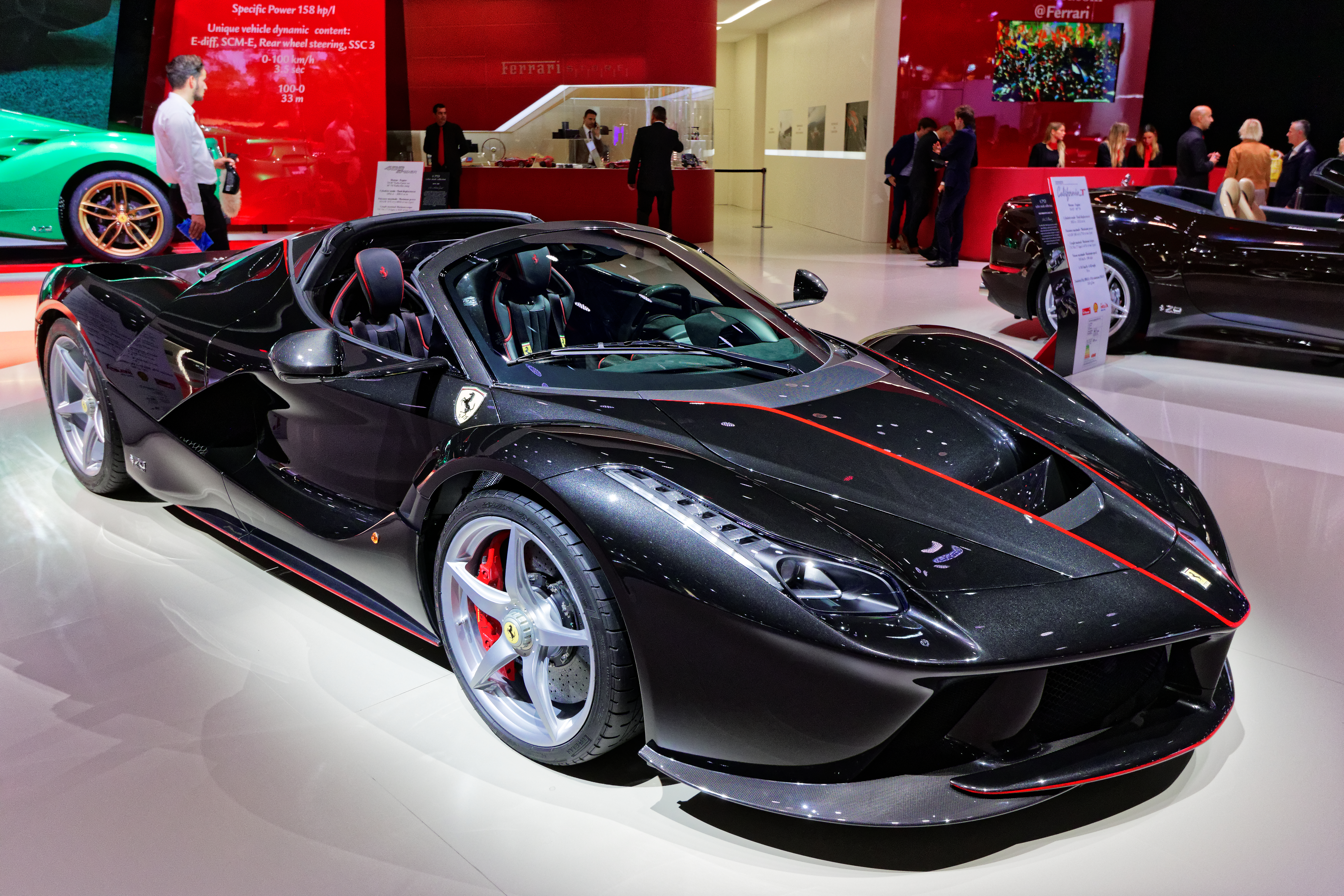 Une Ferrari LaFerrari Aperta présentée lors du mondial de l'automobile de Paris 2016.